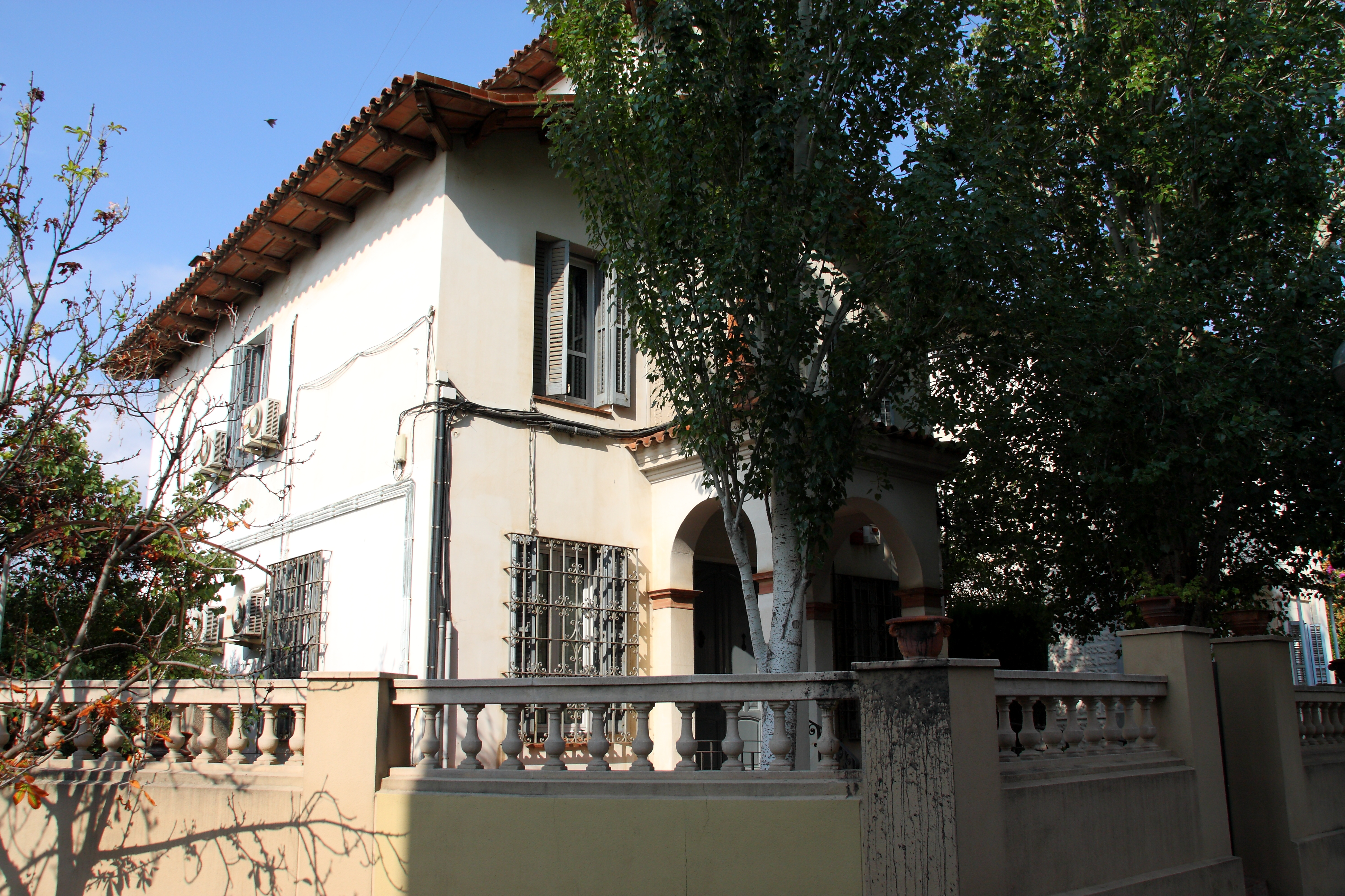 La torre Gelabert, era el antiguo instituto de educación municipal, convertida hoy día, en el departamento de acció social i salud pública del ayuntament de Cornellà.